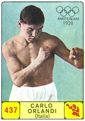 Figurina Campioni dello Sport Panini 1968-69 n.437